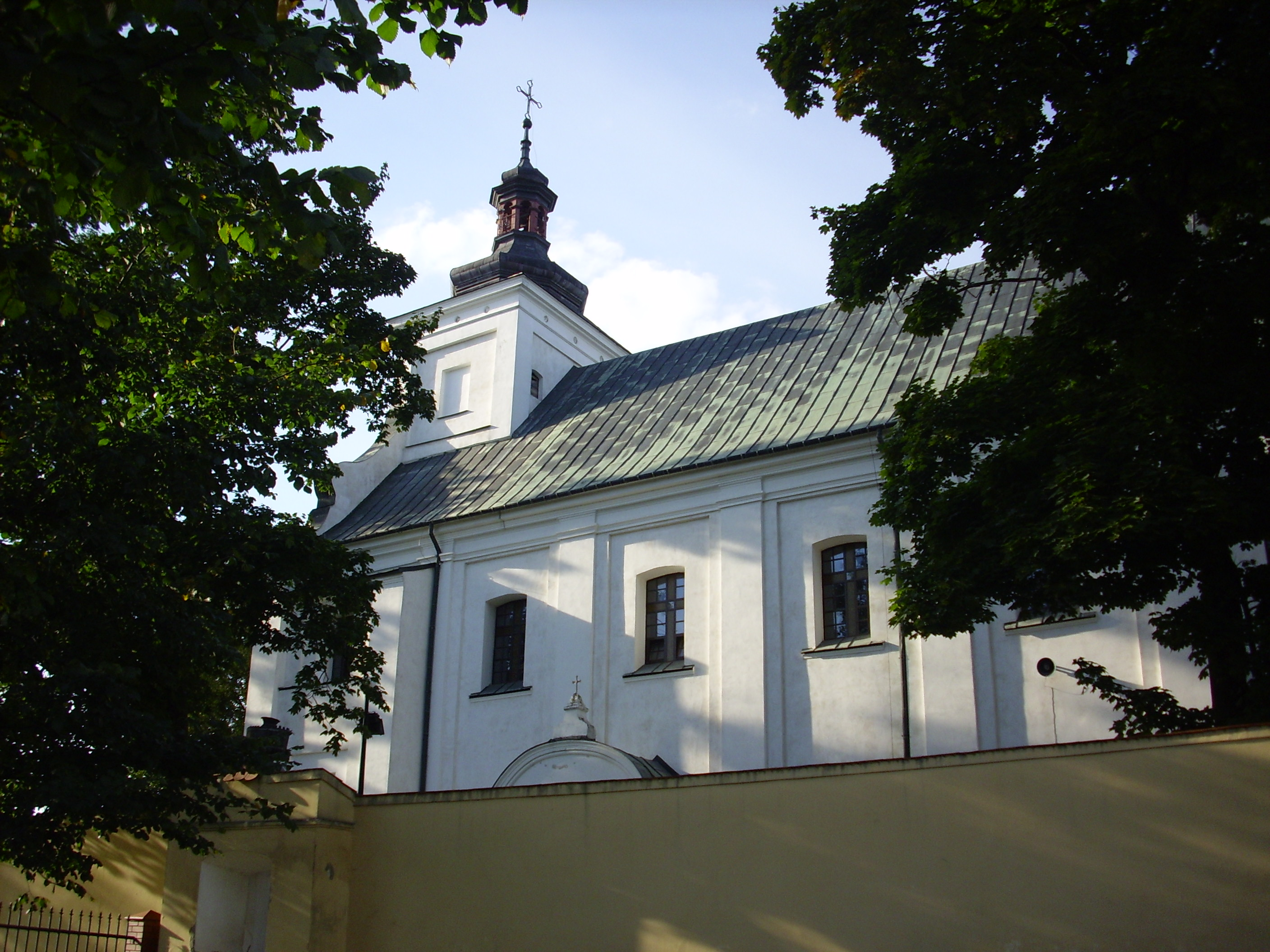 Kościół pw. św. Jana Chrzciciela w Kłoczewie (pow. rycki, woj. lubelskie).